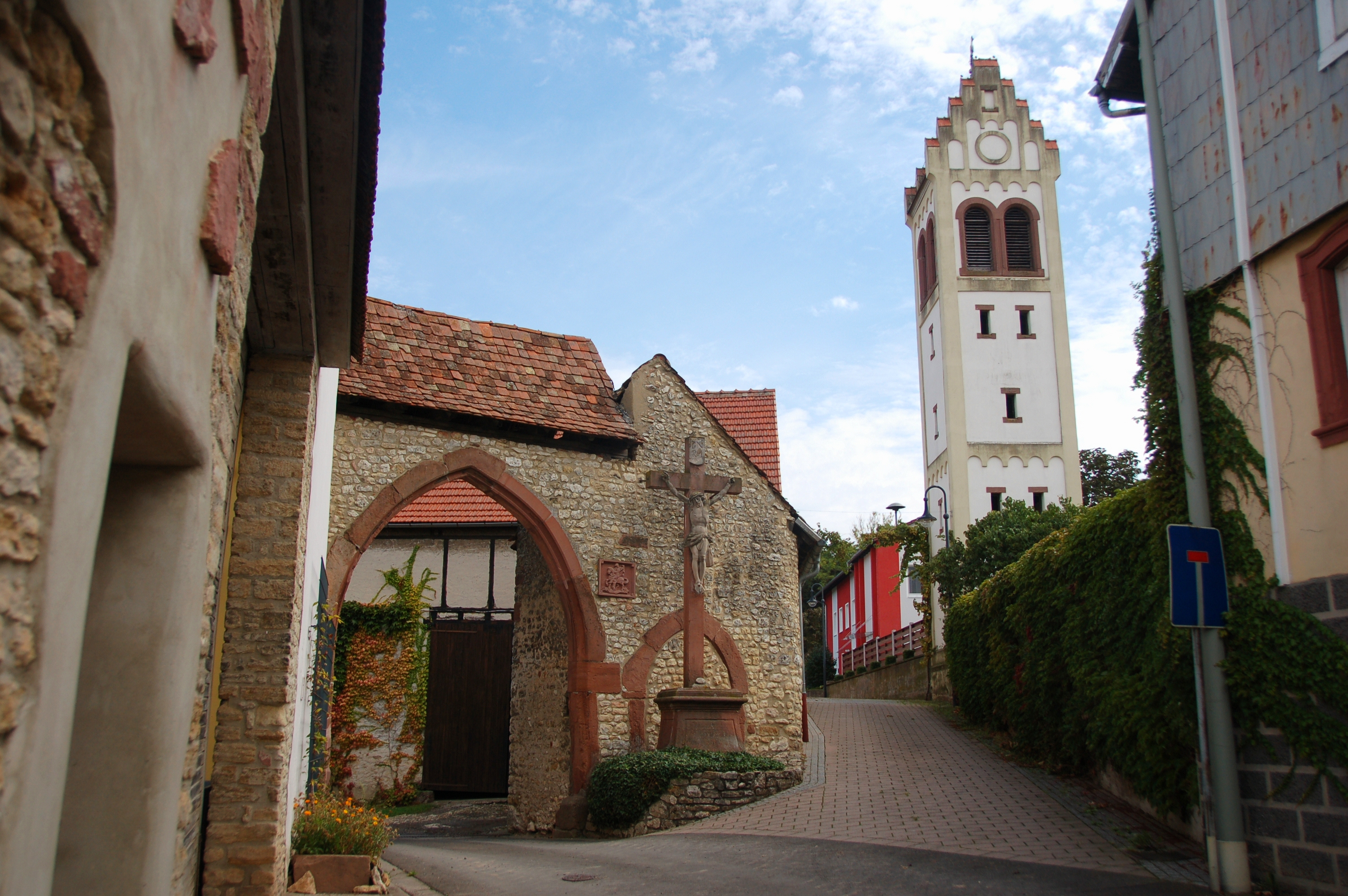 Glockenturm der protestantischen Kirche in Bubenheim; ortsbildprägend